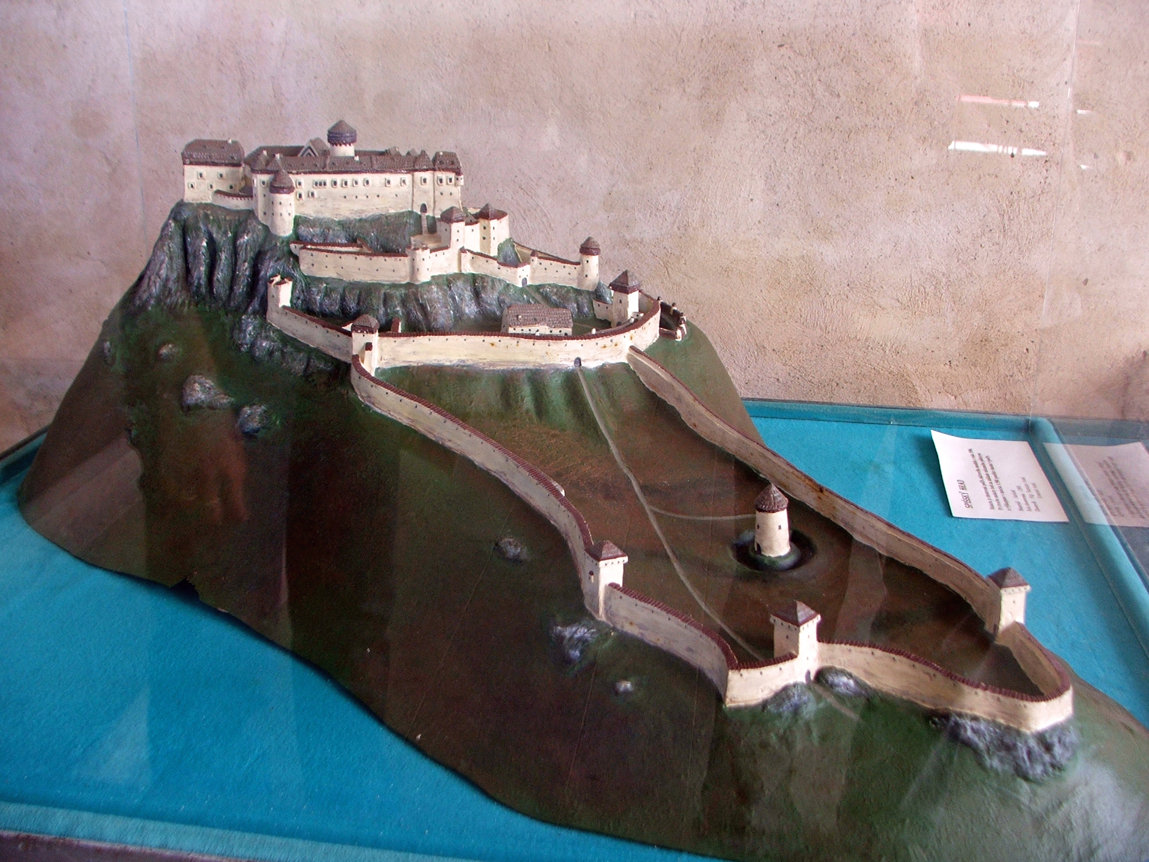 Spis Castle model in Spiš Museum